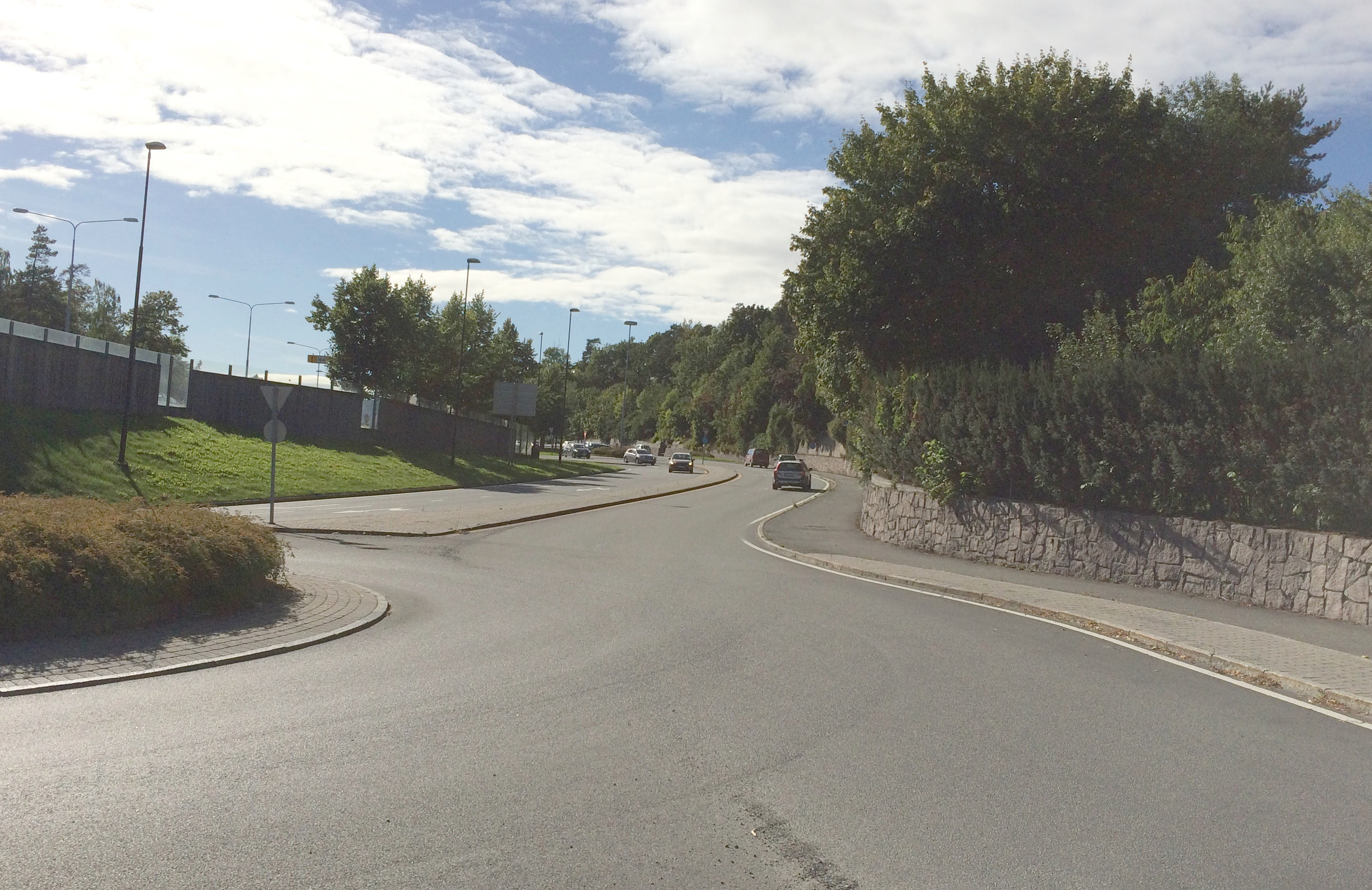 Blommenholm-enden av primær fylkesvei 164